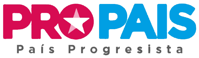 Emblema de País Progresista, partido político chileno